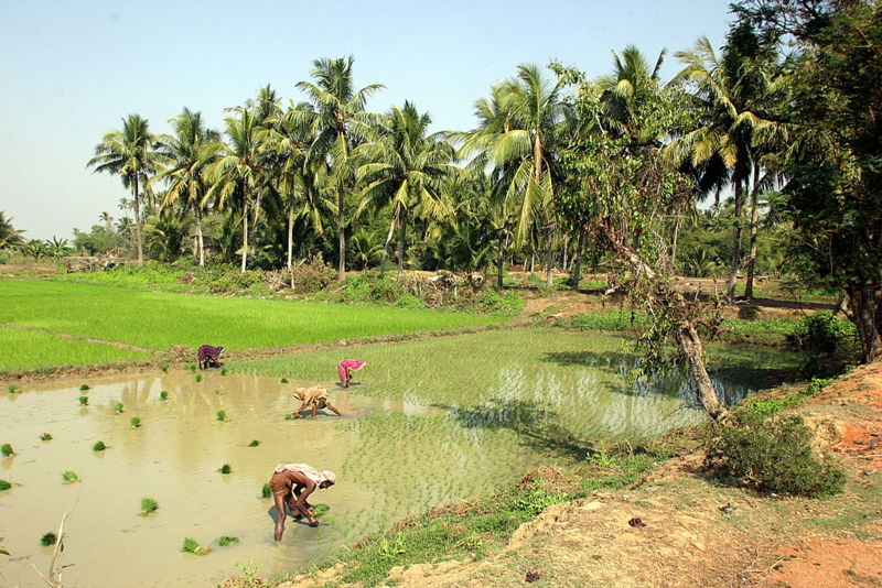 שדות אורז ליד פורי, אוריסה. תמונה של ניר נוסבאום, ינואר 2006